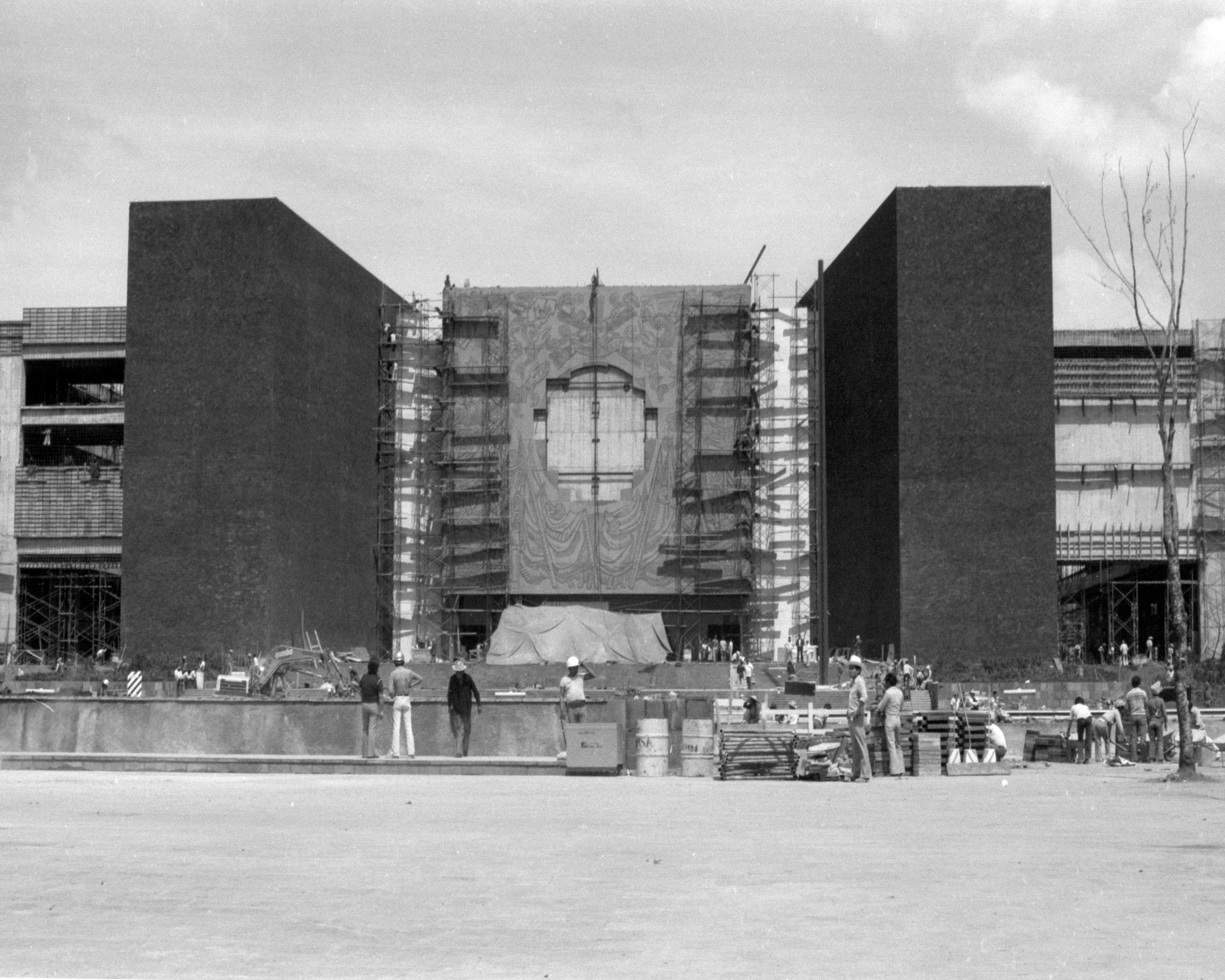 Fotografía antigua de la Ciudad de México resguardadas por el Museo Archivo de la Fotografía (MAF) de la Ciudad de México.